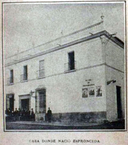 Casa dónde nació Espronceda